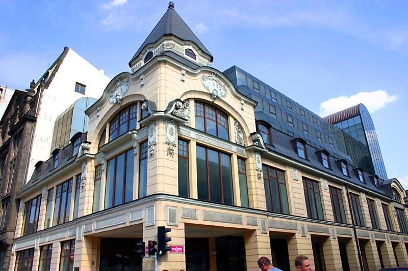 Piotrkowska Street, Lodz, Poland